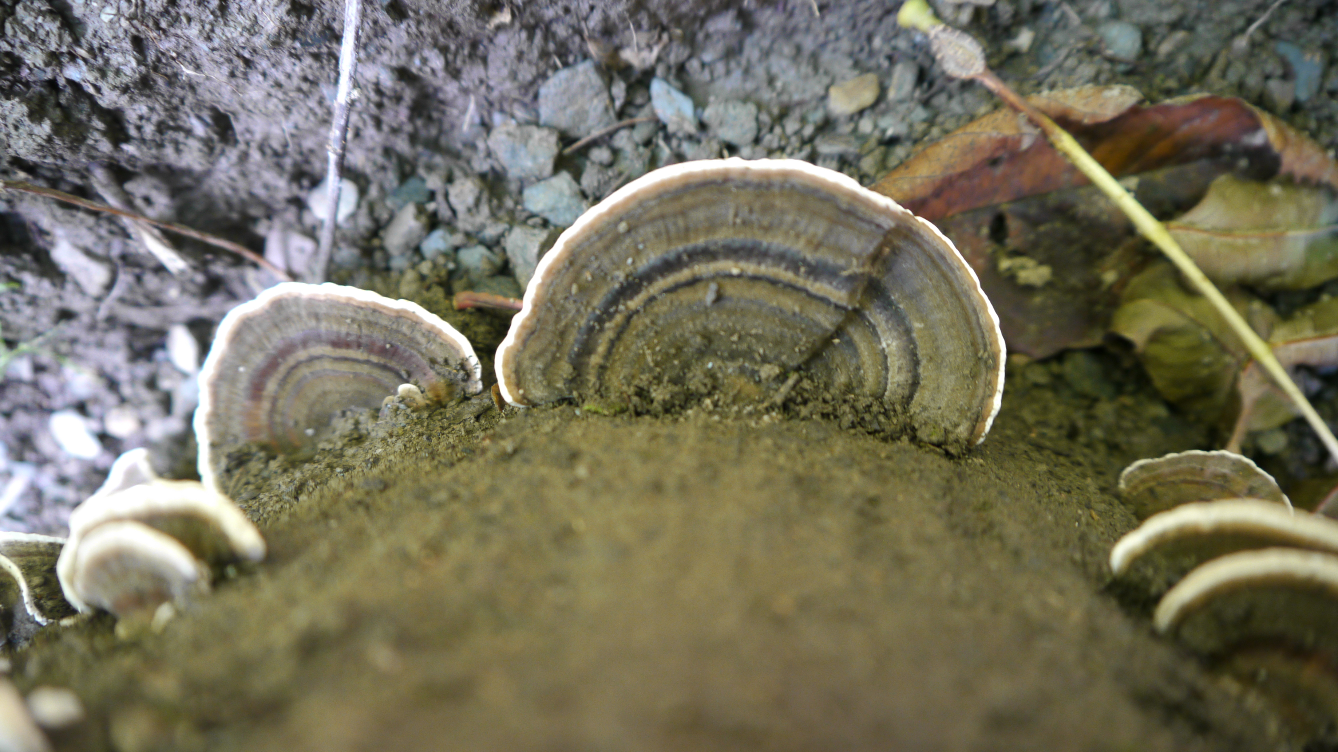 Trametes versicolor sur bûche de chêne, 21 août 2019